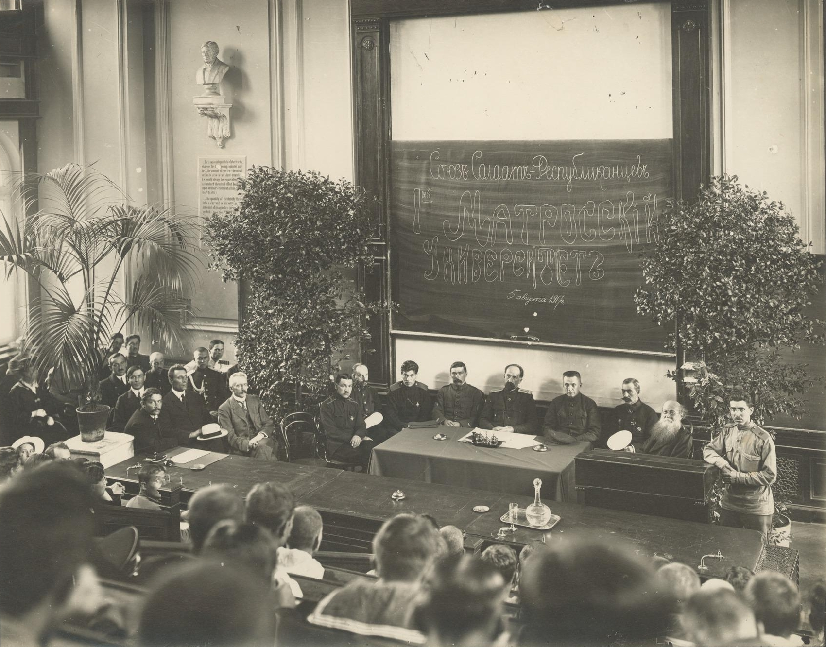 Открытие Матросского университета, учрежденного 5 августа 1917 г., в аудитории Петроградского университета.